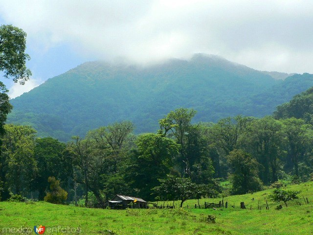 Volcan San Martìn Tuxtla, San Andrés Tuxtla, Veracruz, Mexico